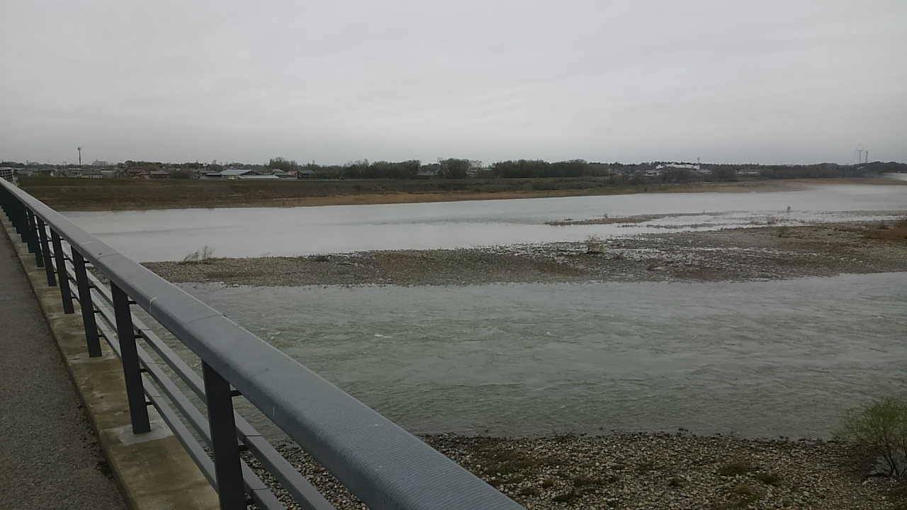 松倉城遠望